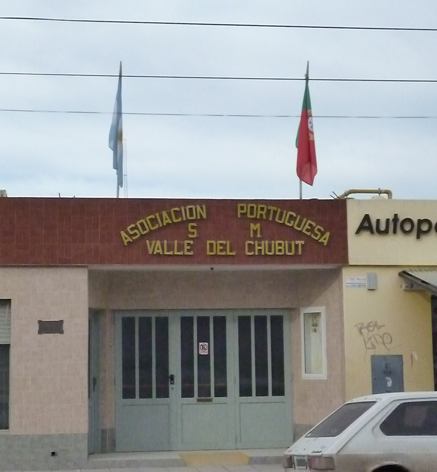 Asociacion Portuguesa Valle del Chubut, Trelew, Argentina